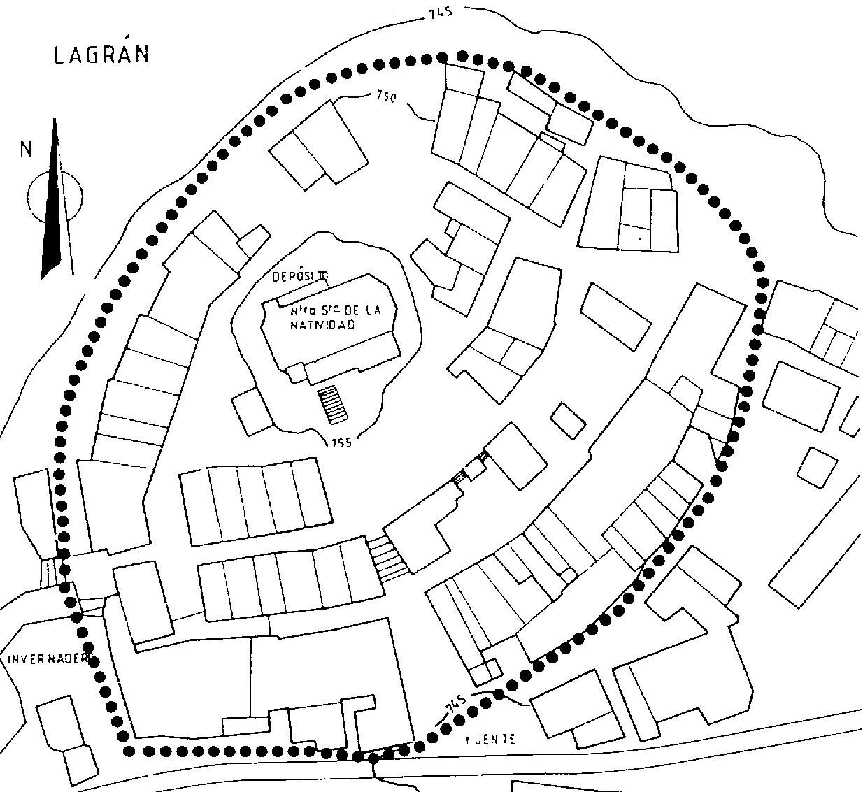 Lagrango hirigune historikoaren oinplanoa